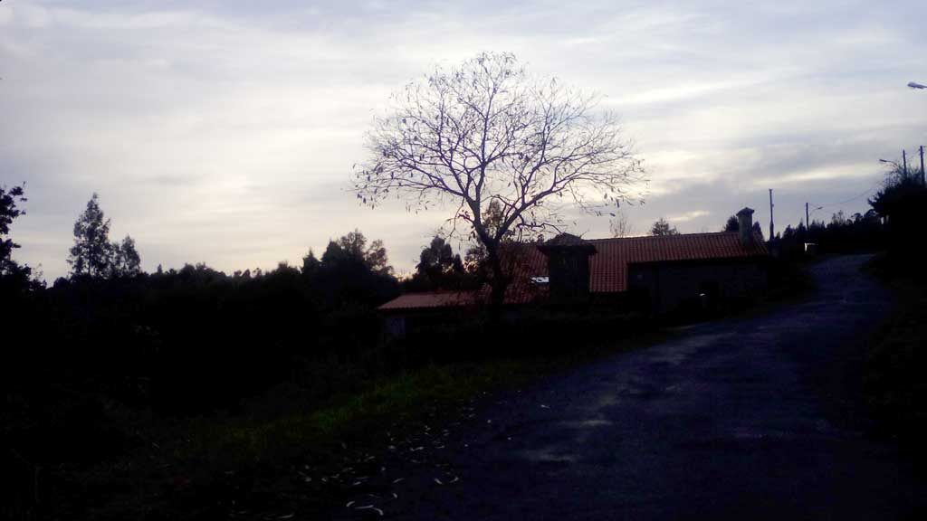 Noite en Martín, Brión.